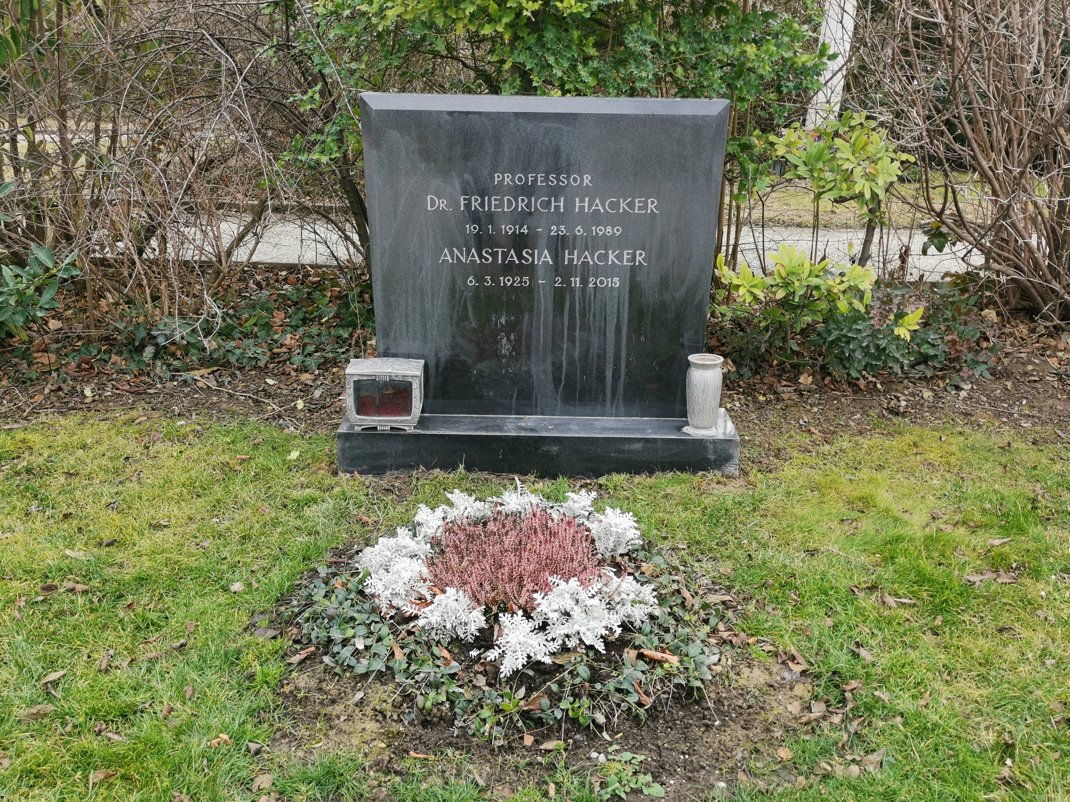 Grab von Friedrich Hacker auf dem Wiener Zentralfriedhof